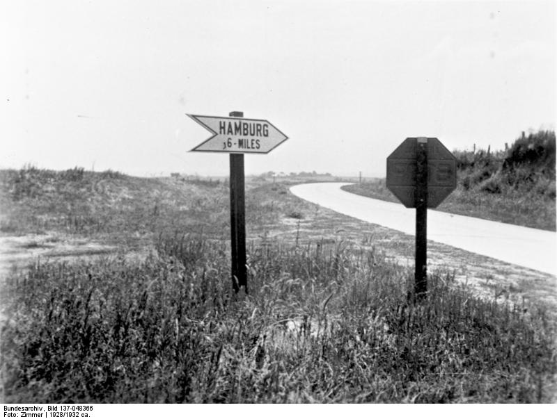 Vereinigte Staaten, Minnesota, Wegetafel für Hamburg